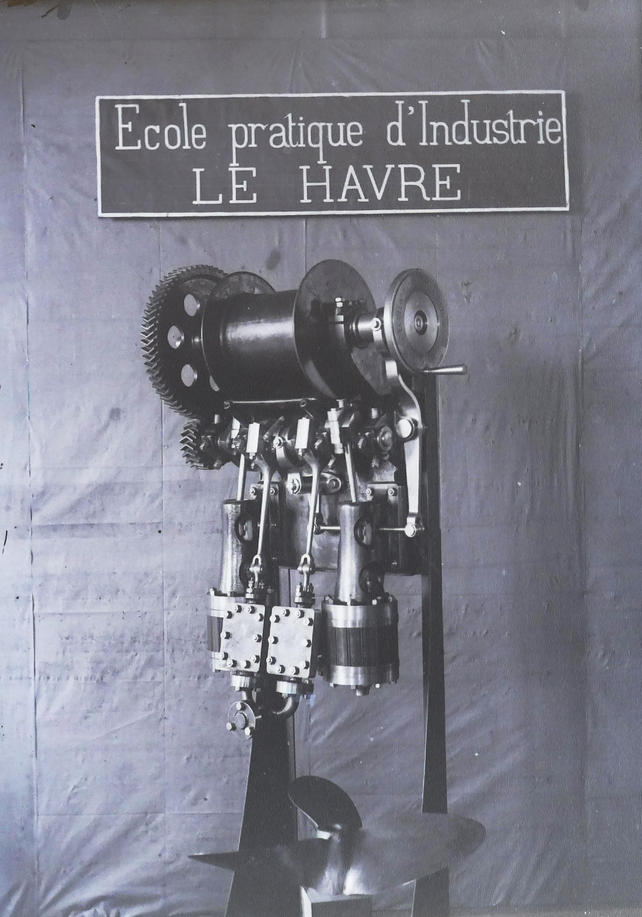 mécanisme école industrie havre